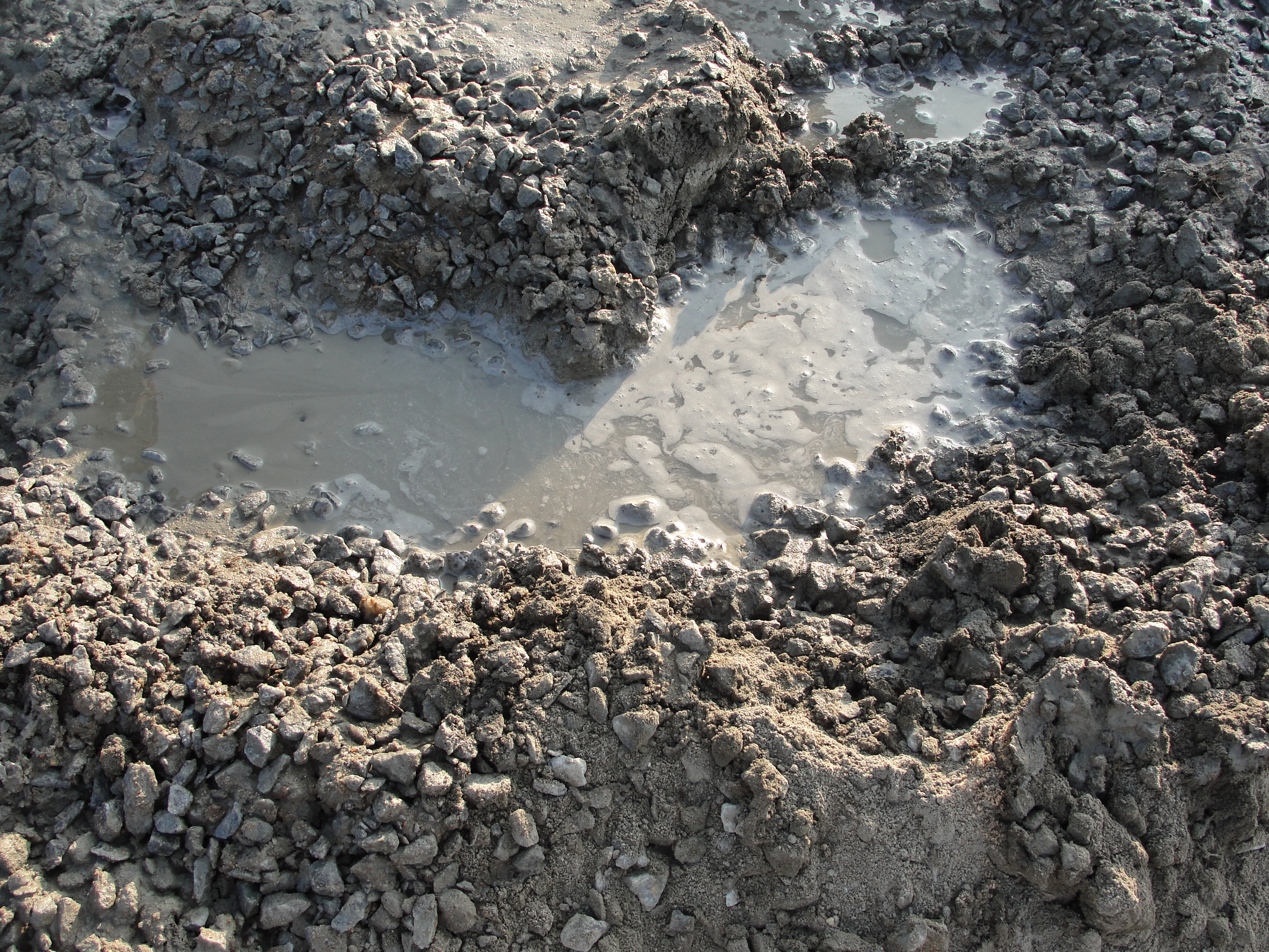 பைஞ்சுதைக் கலவை (கற்காரைக் கலவை) Unknown